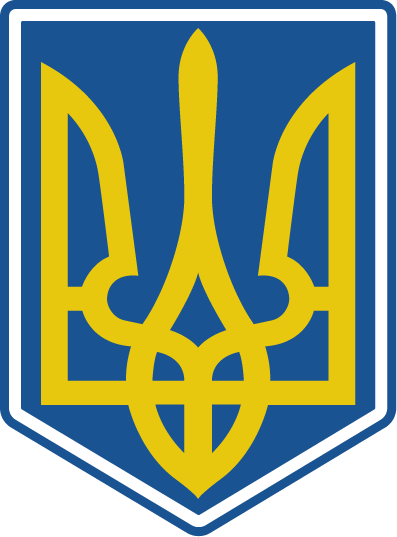 Емблема збірної України з хокею: Емблема збірної України з хокею